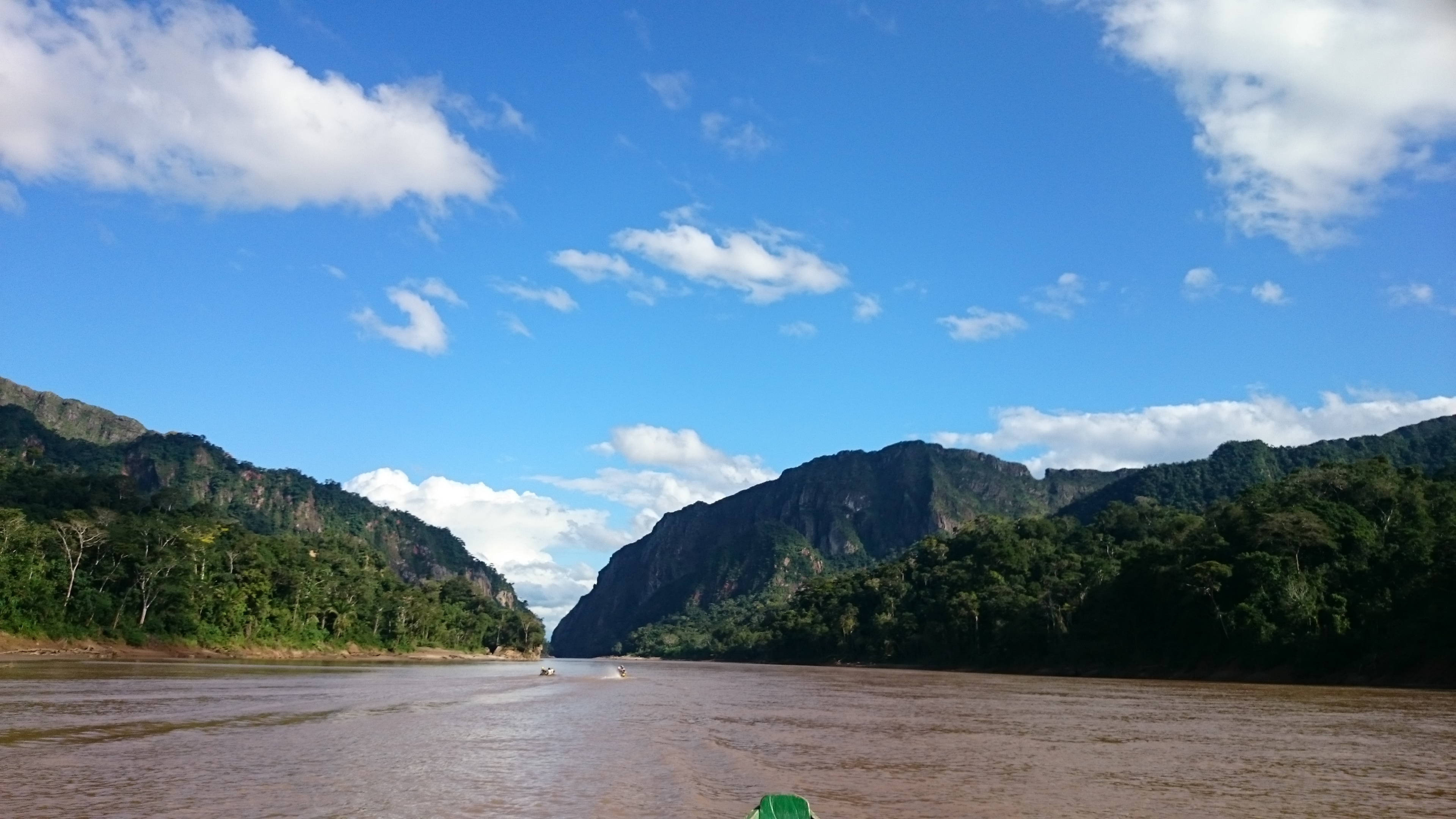 Encañando El bala, Rurrenabaque